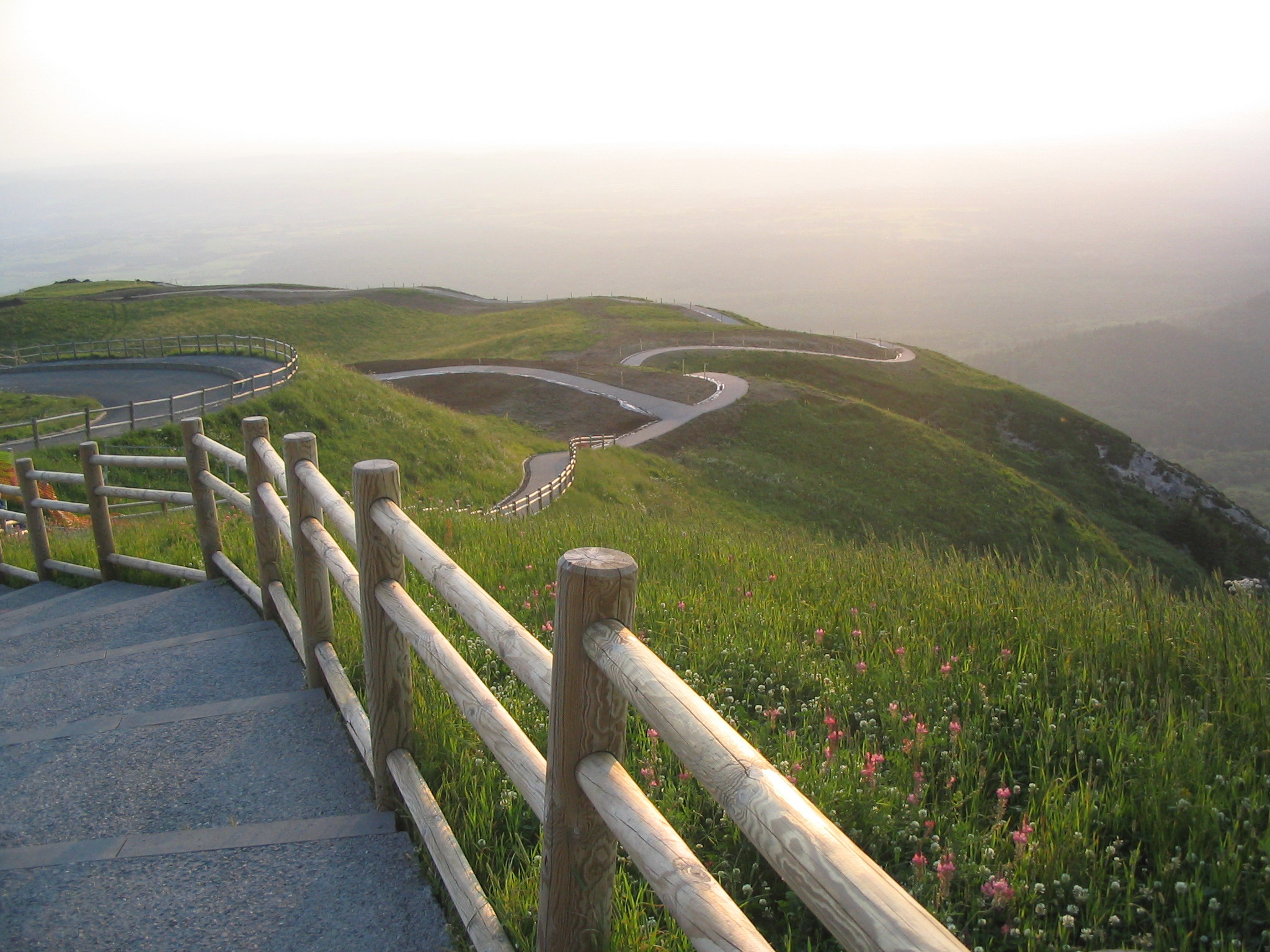 Vue sur la Chaîne des Puys (les Monts-Dôme), prise depuis le Puy-de-Dôme.